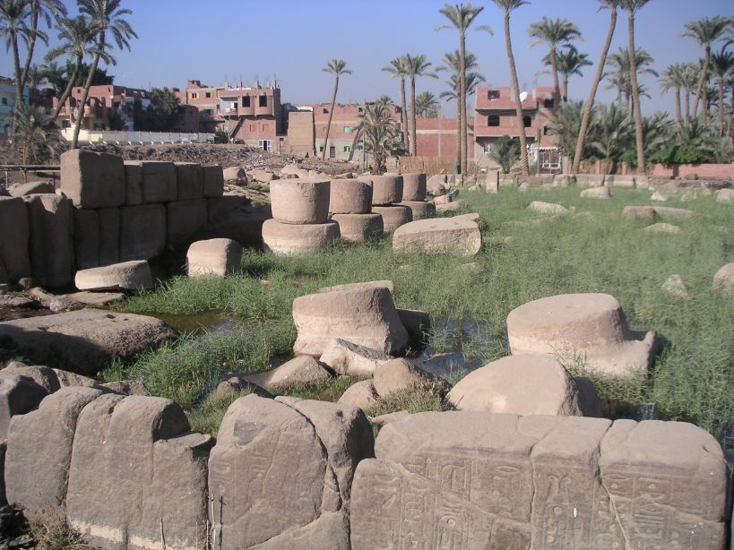 Vue de la salle hypostyle de Ramsès II du grand temple de Ptah de Memphis - XIXe dynastie égyptienne - Mit Rahineh